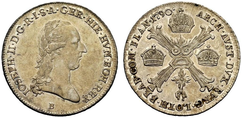 Joseph II.: Viertelkronentaler, Kremnica 1790 (Jaeger 42). Numismatica Ranieri, Online Auction 5.